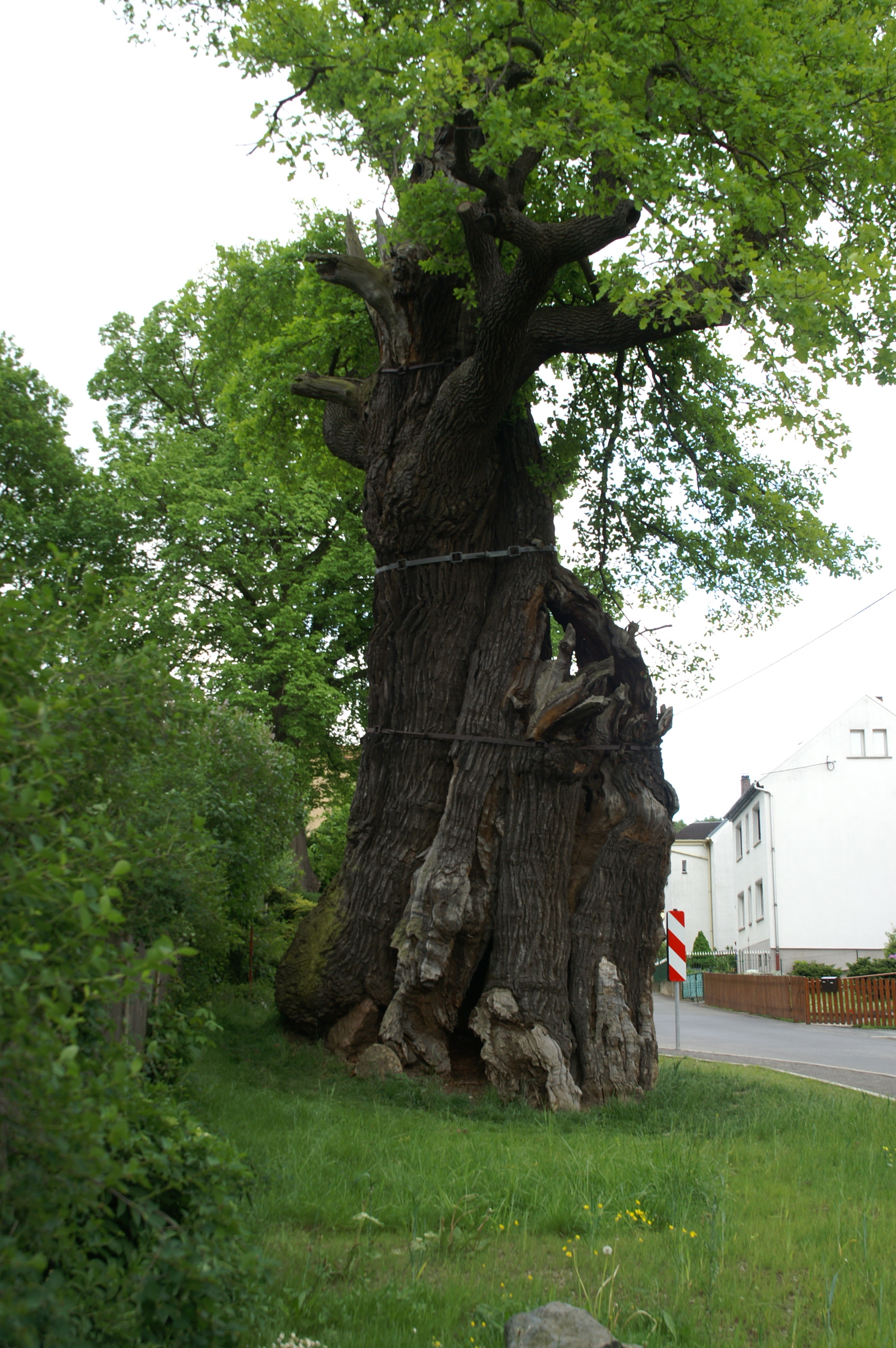 Oak in Noebdenitz, Germany